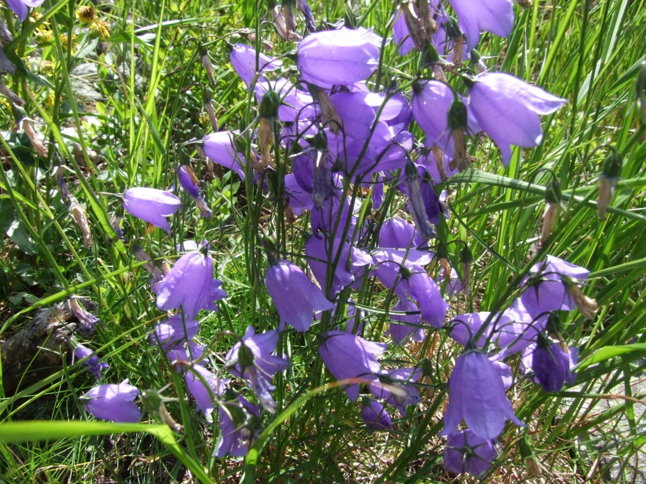 Campanula polymorpha (habitat:Tatra Mountains - Dolina Jaworzynka)